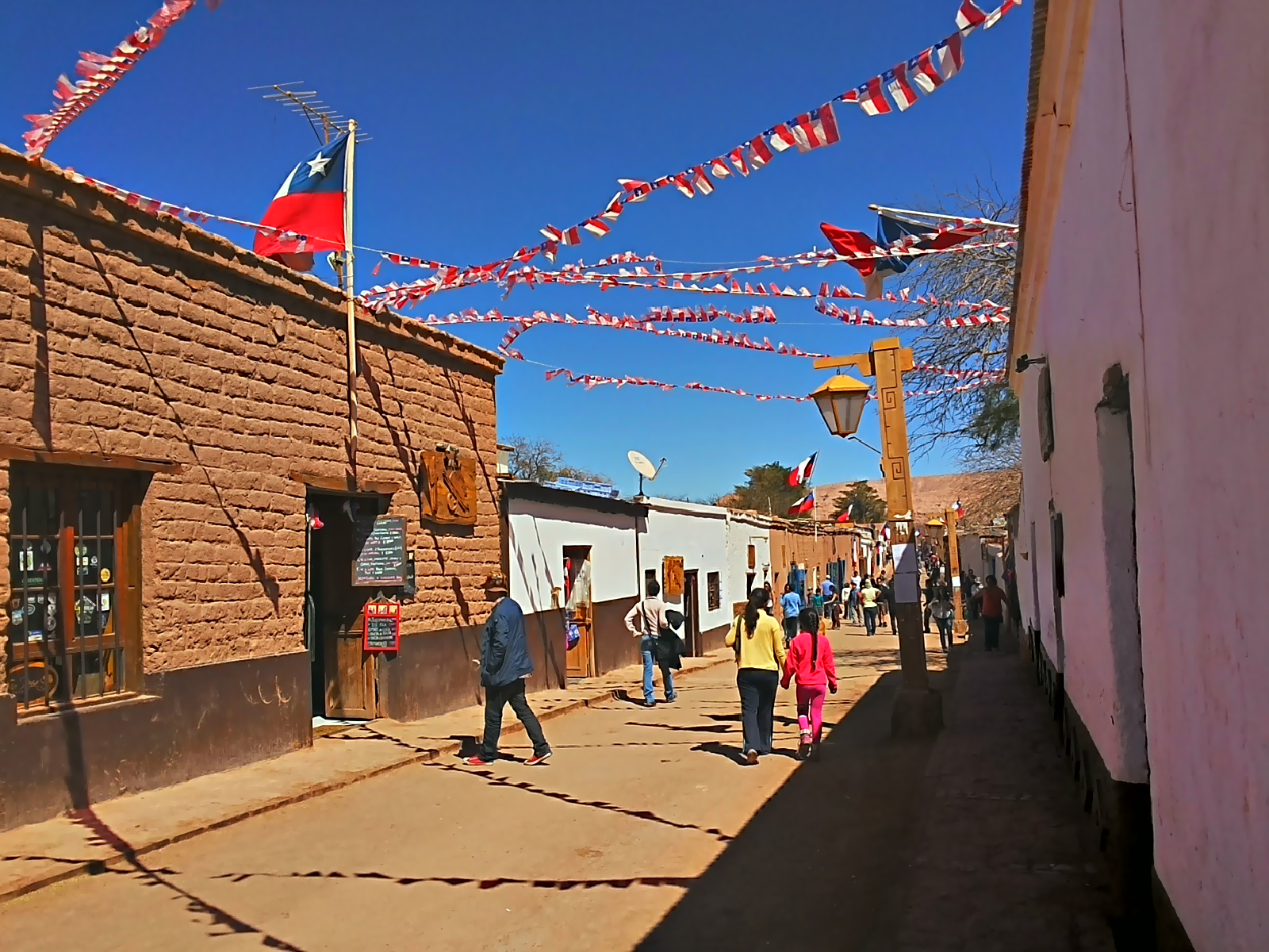 Pueblo de San Pedro de Atacama This is a photo of a national monument in Chile: 325